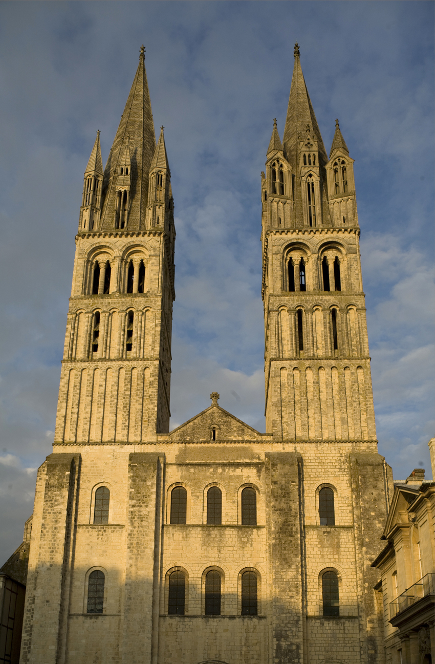 This building is en partie classé, en partie inscrit au titre des Monuments Historiques. .